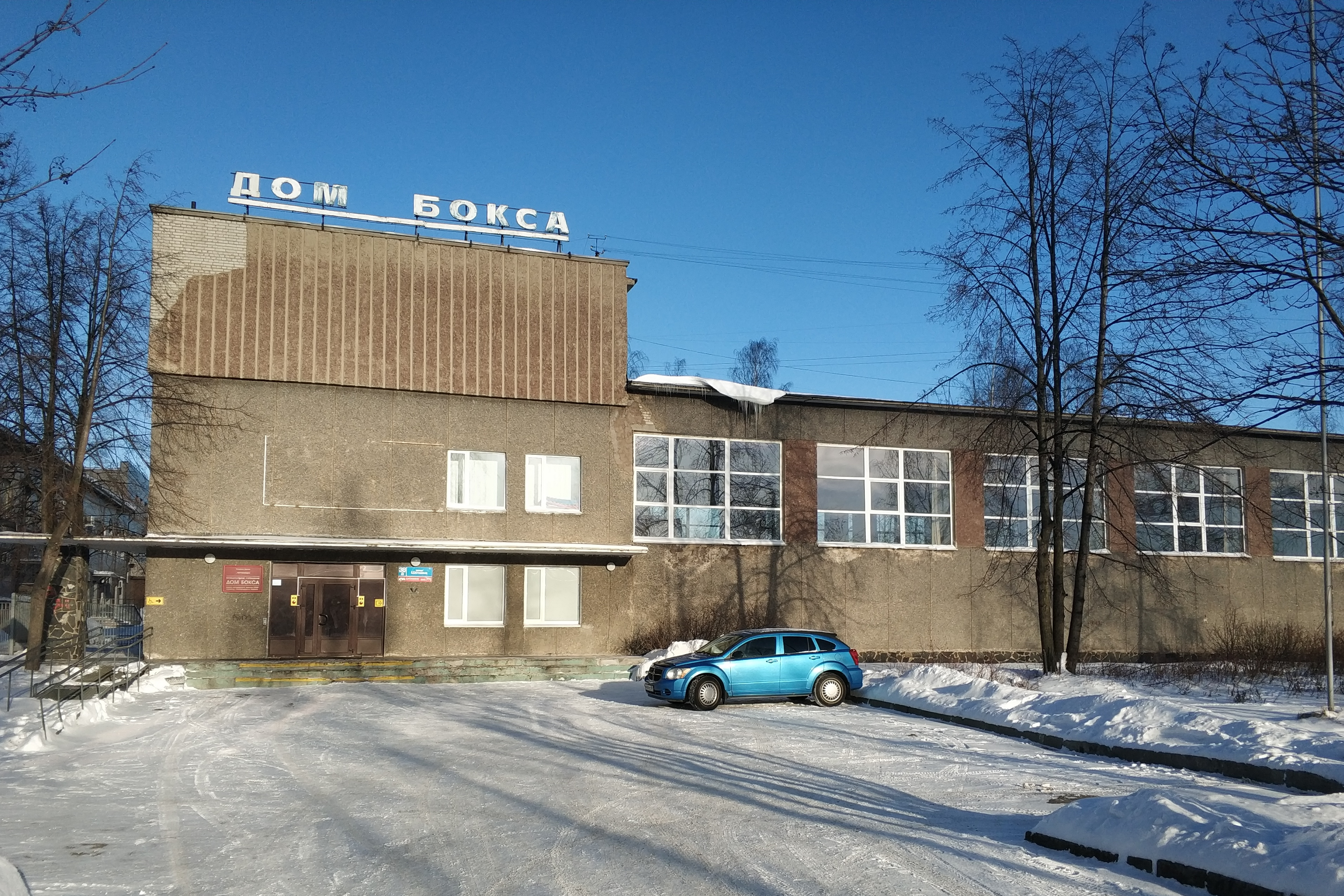 Здание Дома бокса имени Л.Г.Левина (построено в 1972 году) . Петрозаводск, ул.Шотмана, 38А